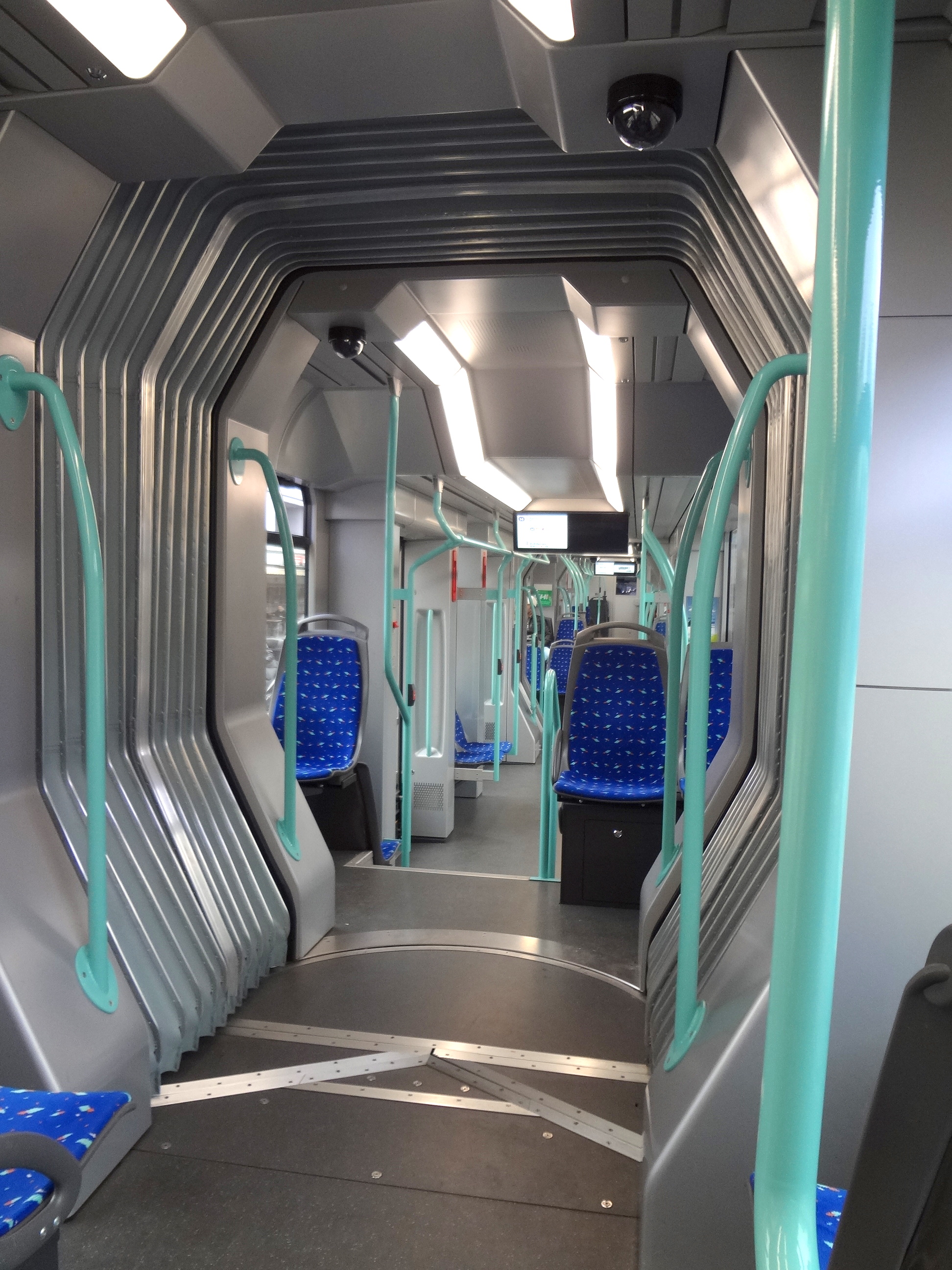 Ligne 14 à Genève, intérieur.